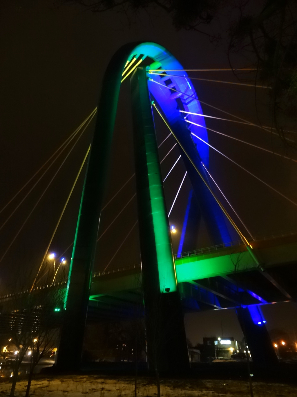 Pylon Trasy Uniwersyteckiej w Bydgoszczy nocą